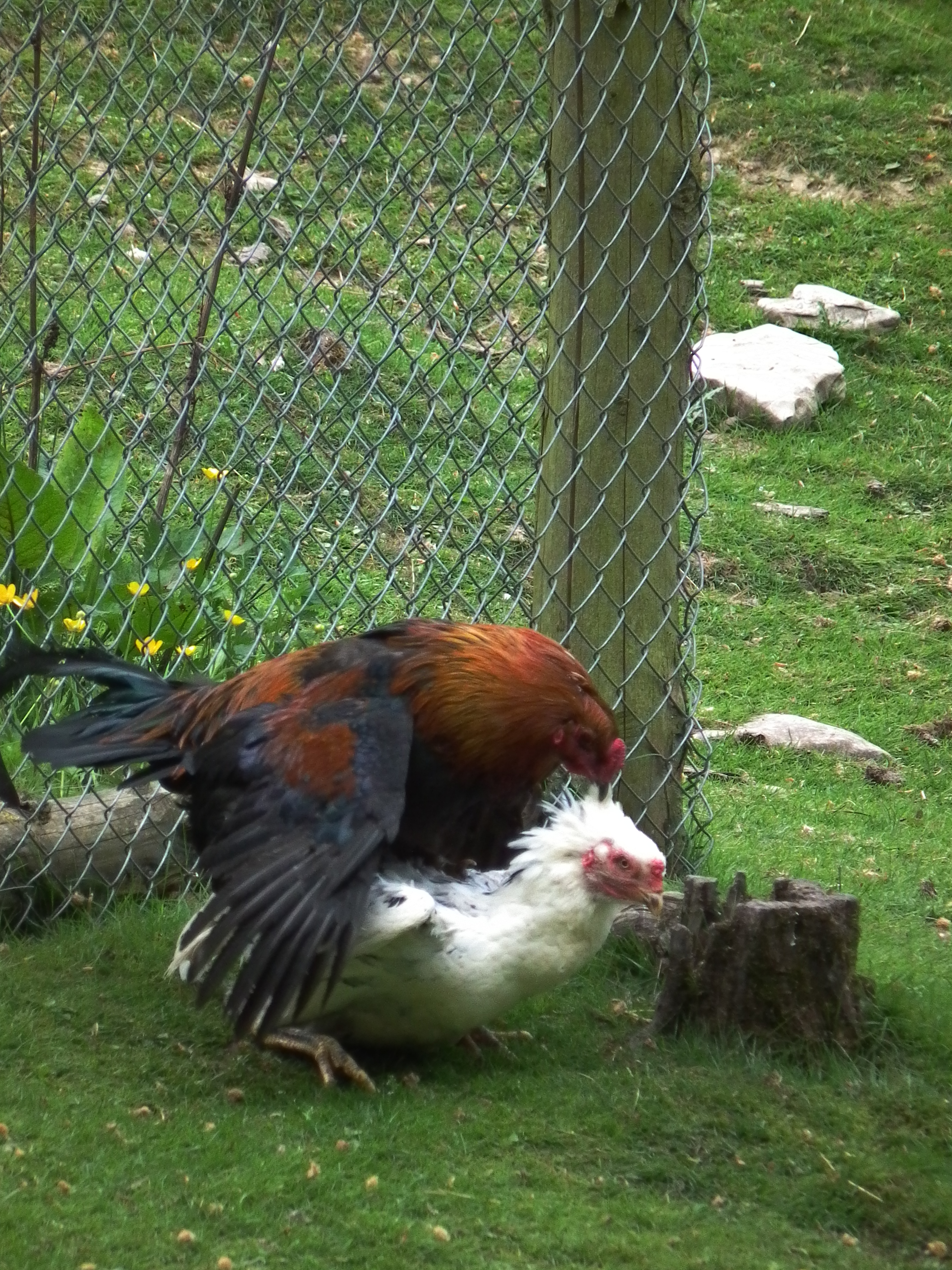 Haushühner im Tierpark Bretten (Baden-Württemberg, Deutschland)